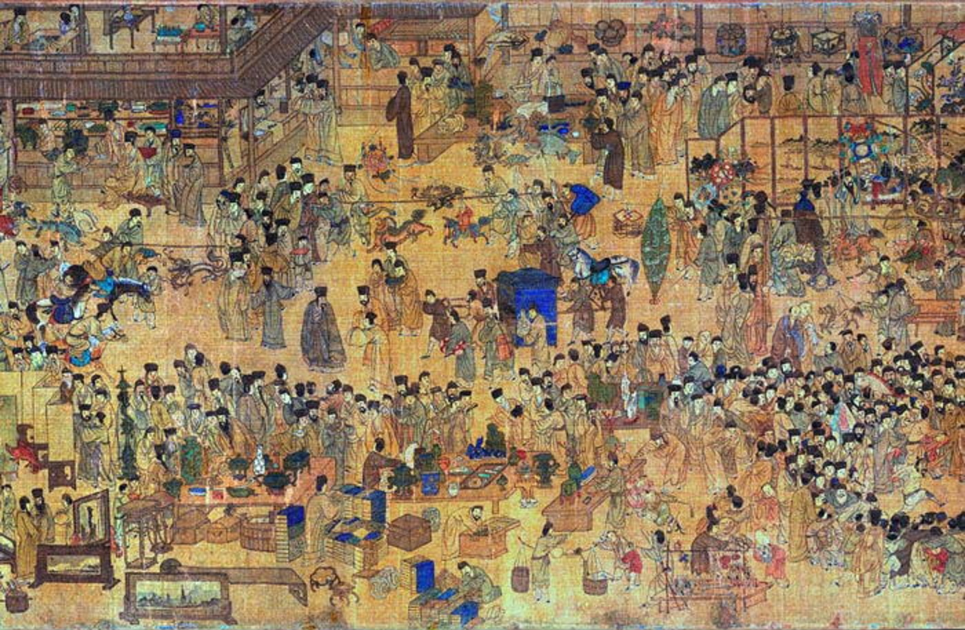 中文（香港）: 明《上元燈彩圖》